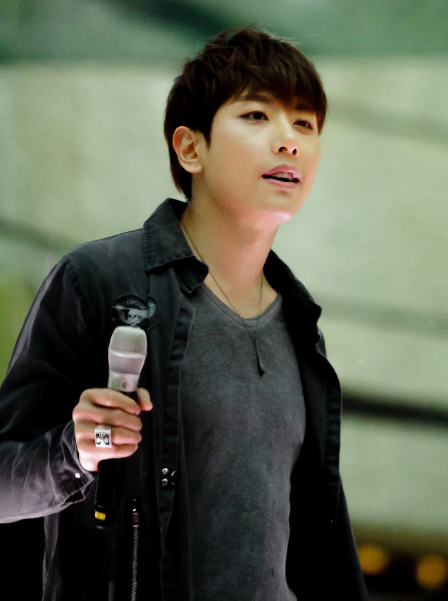 2013년 5월 8일 메세나폴리스에서 박효신.